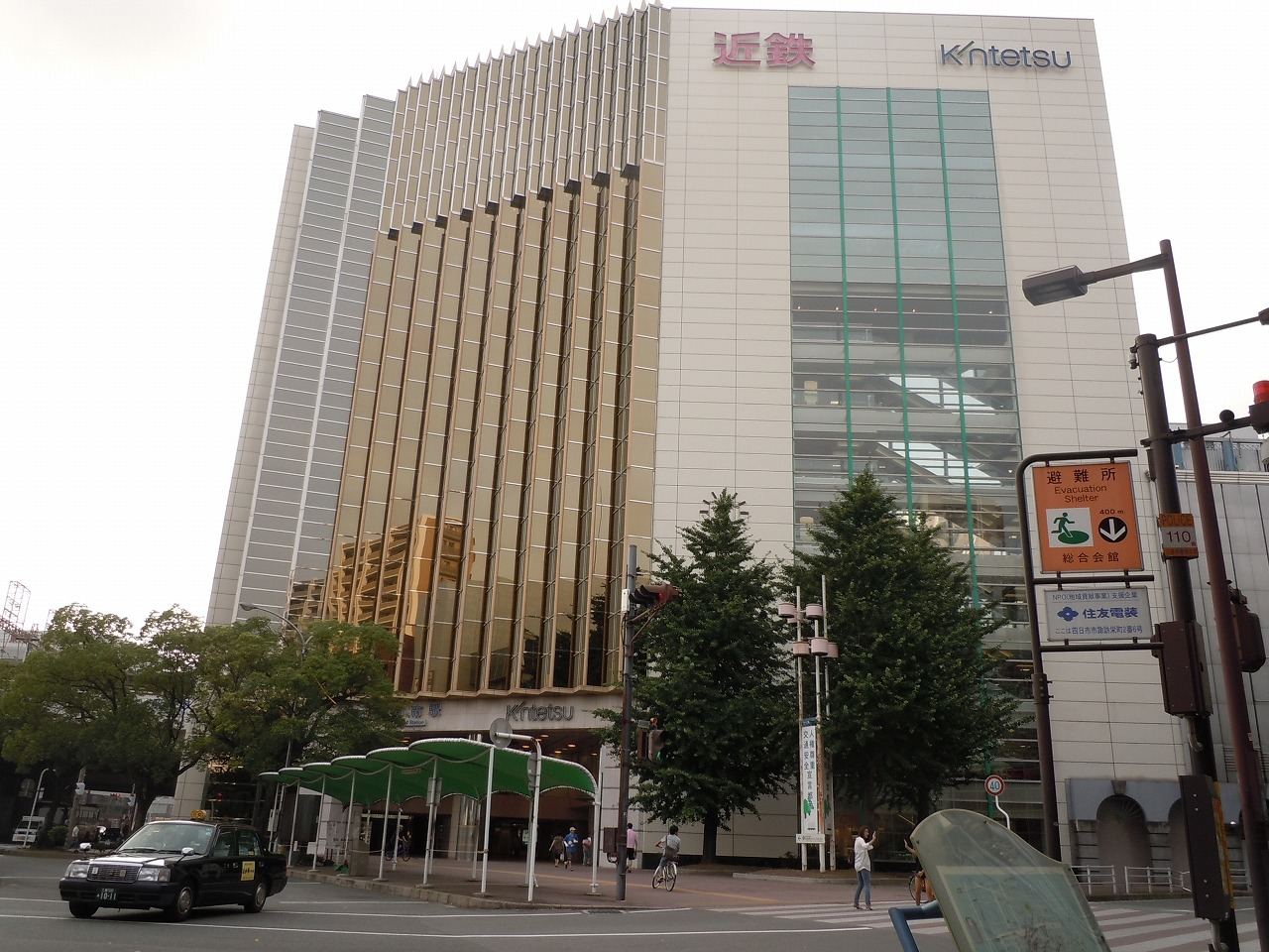 近鉄百貨店が入っている近鉄四日市駅ビルです 三重県で一番大きな駅ビルかつ駅です